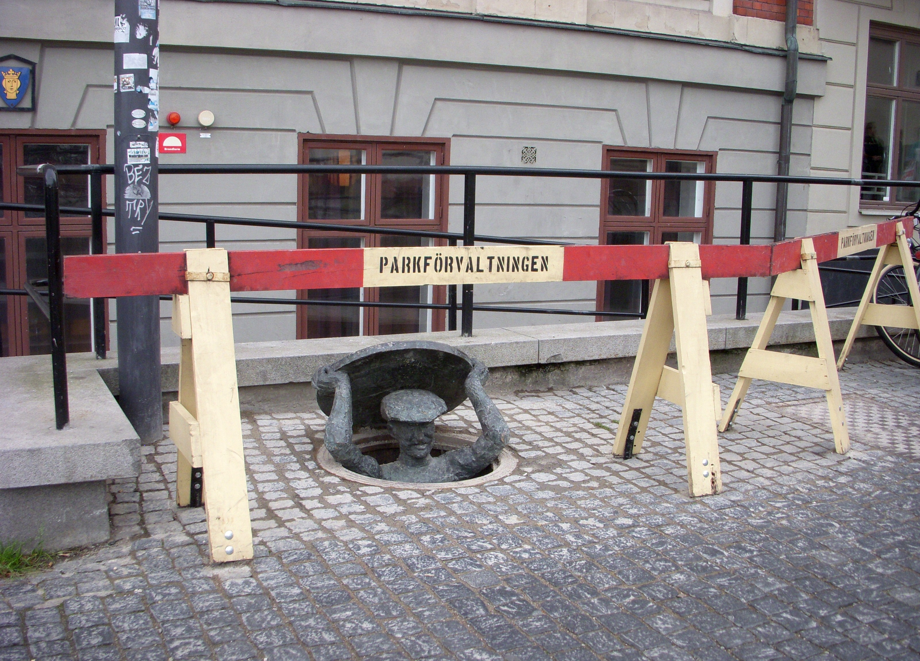 Skulptur "Humor" vid Slussen